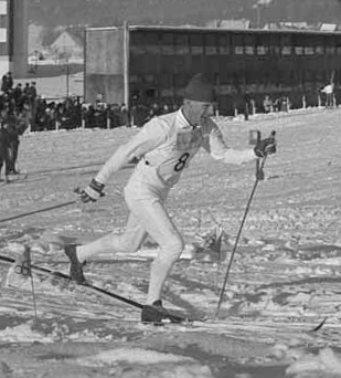 Bruno Åvik, Grenoble Olympics